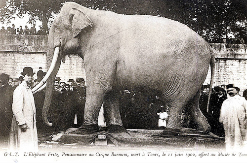 Légende : "L'éléphant Fritz, pensionnaire au cirque Barnum, mort à Tours, le 11 juin 1902, offert au musée de Tours." L'éléphant est empaillé.